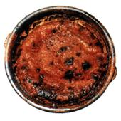 Tigelada, doce típico da zona de Proença-a-Nova